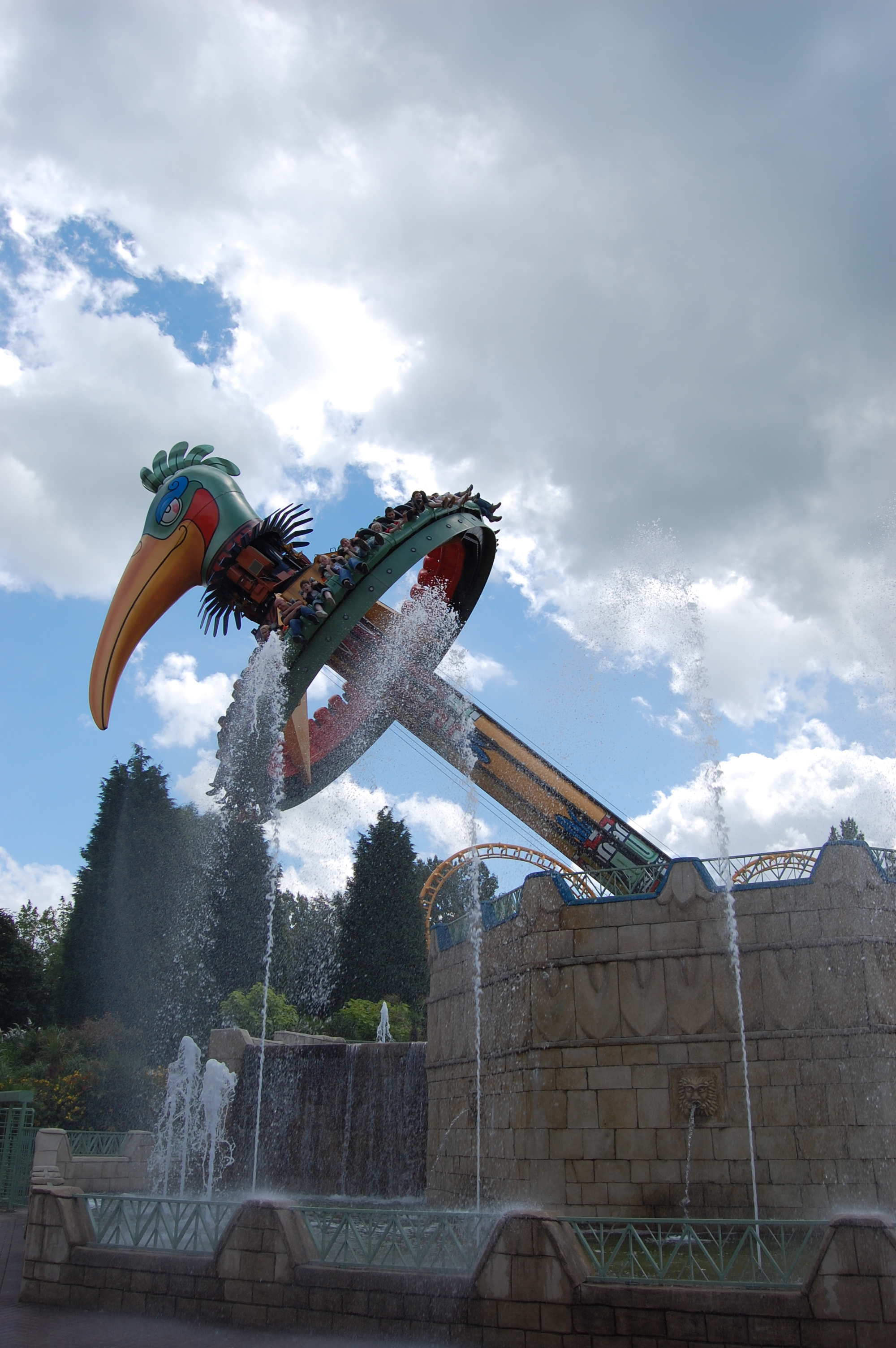 De El Volador in Bellewaerde Park, gezien vanaf het Mexicoplein